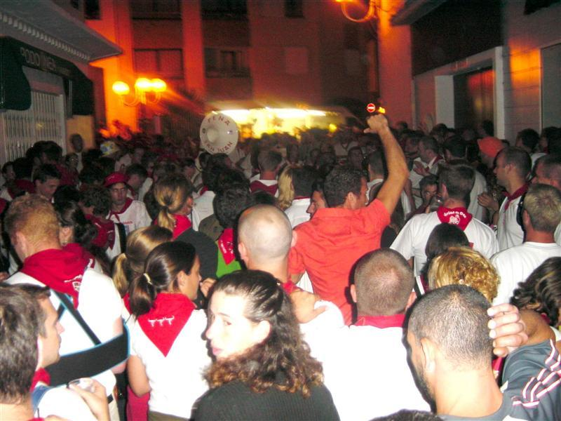 Vue nocturne des Fêtes de Dax (Landes, France)